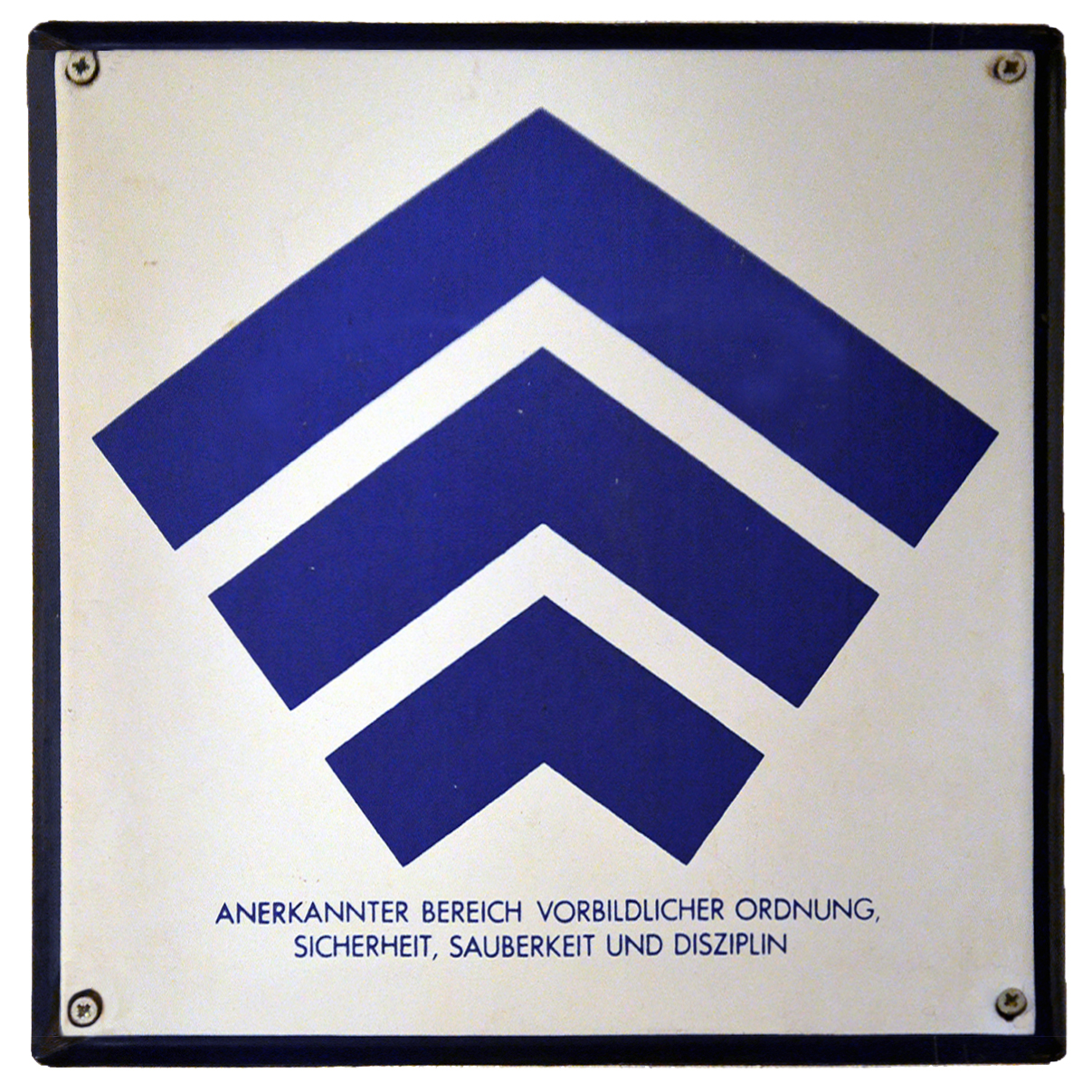 Während der Filmregisseur Wenzel Storch im Kino im Sprengel in der Nordstadt von Hannover noch sein Leben in Bildern vorstellte, fotografierte ein Mensch aus dem Publikum dieses im Eingangsbereich des Kinos an die Wand angeschraubte Emaille-Schild „Anerkannter Bereich vorbildlicher Ordnung, Sicherheit, Sauberkeit und Disziplin“ aus DDR-Zeiten, mit dem sich das nordstädter Filmkollektiv wohl augenzwinkernd selbst ausgezeichnet hat ...